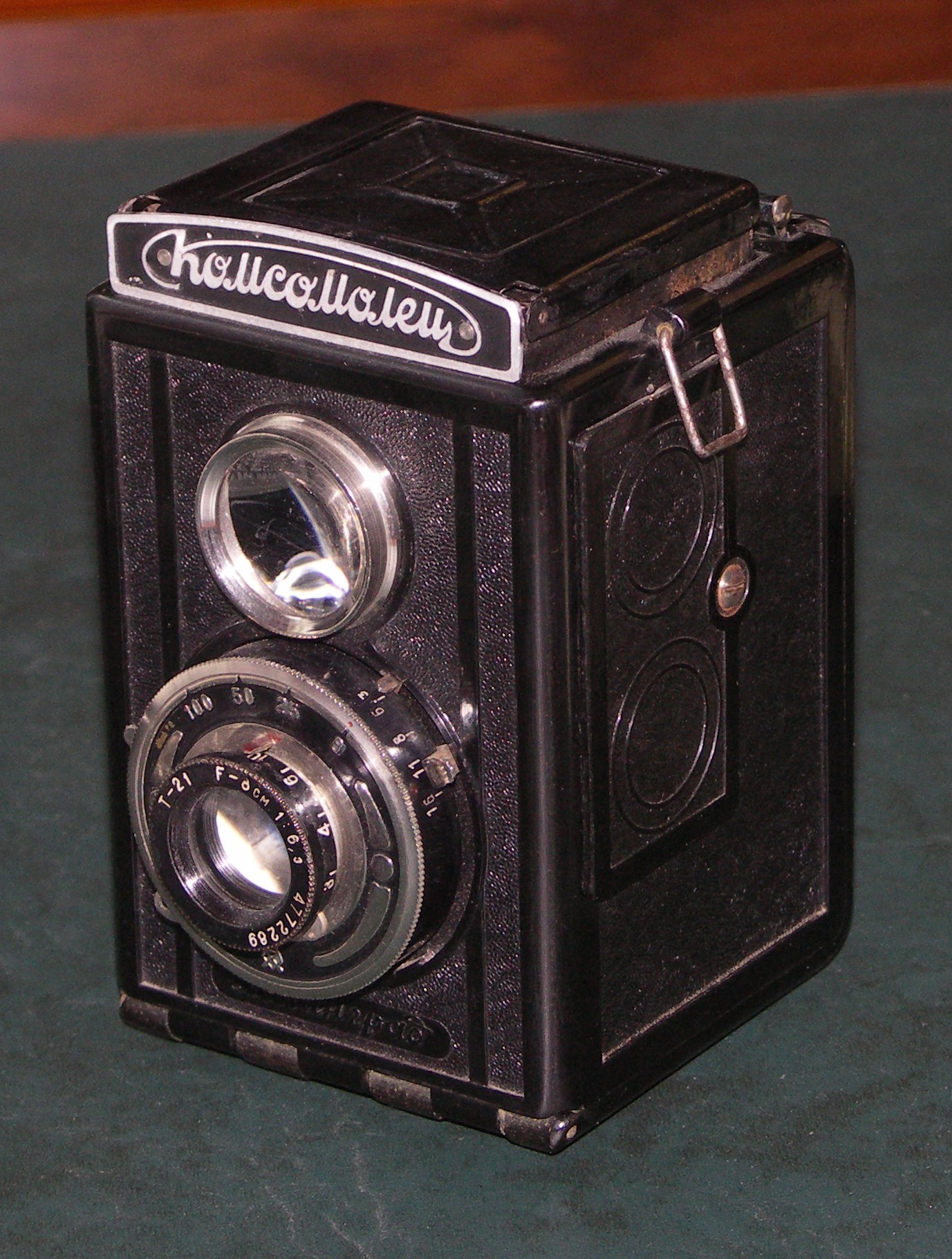 Советский среднеформатный двухобъективный фотоаппарат «Комсомолец», завод ГОМЗ, 1946—1951 годы